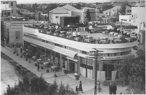 Gan Rave Cafe in Tel Aviv (2 Bialik St) in 1933